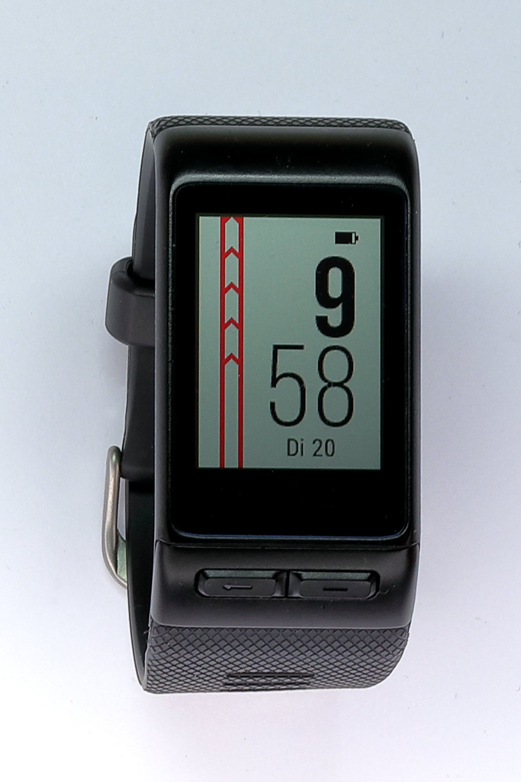 Die Garmin-Smartwatch Vivoactive HR. Sie kam etwa Mitte 2016 um rd. 270 € auf den deutsch-österr. Markt. An Sensorik sind verbaut: GPS, GLONASS, Handgelenks-Herzfrequenzmessung, barometrischer Höhenmesser, Beschleunigungsmesser, Kompass, Thermometer und Umgebungslichtsensor.